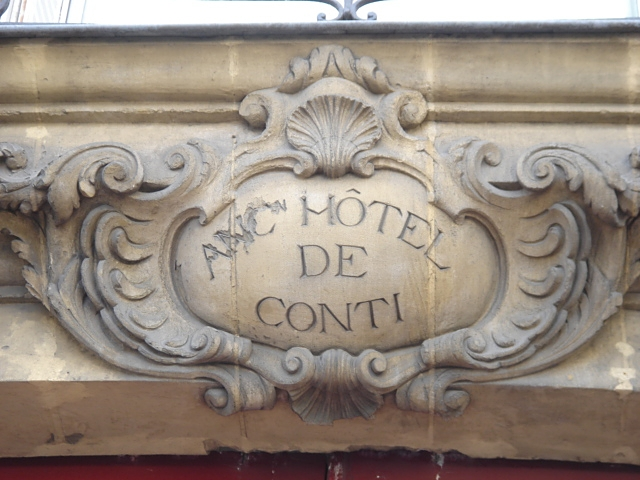 Clef de voute, porte hôtel de Conti, France, XVIIIe siècle. Saint-Germain.